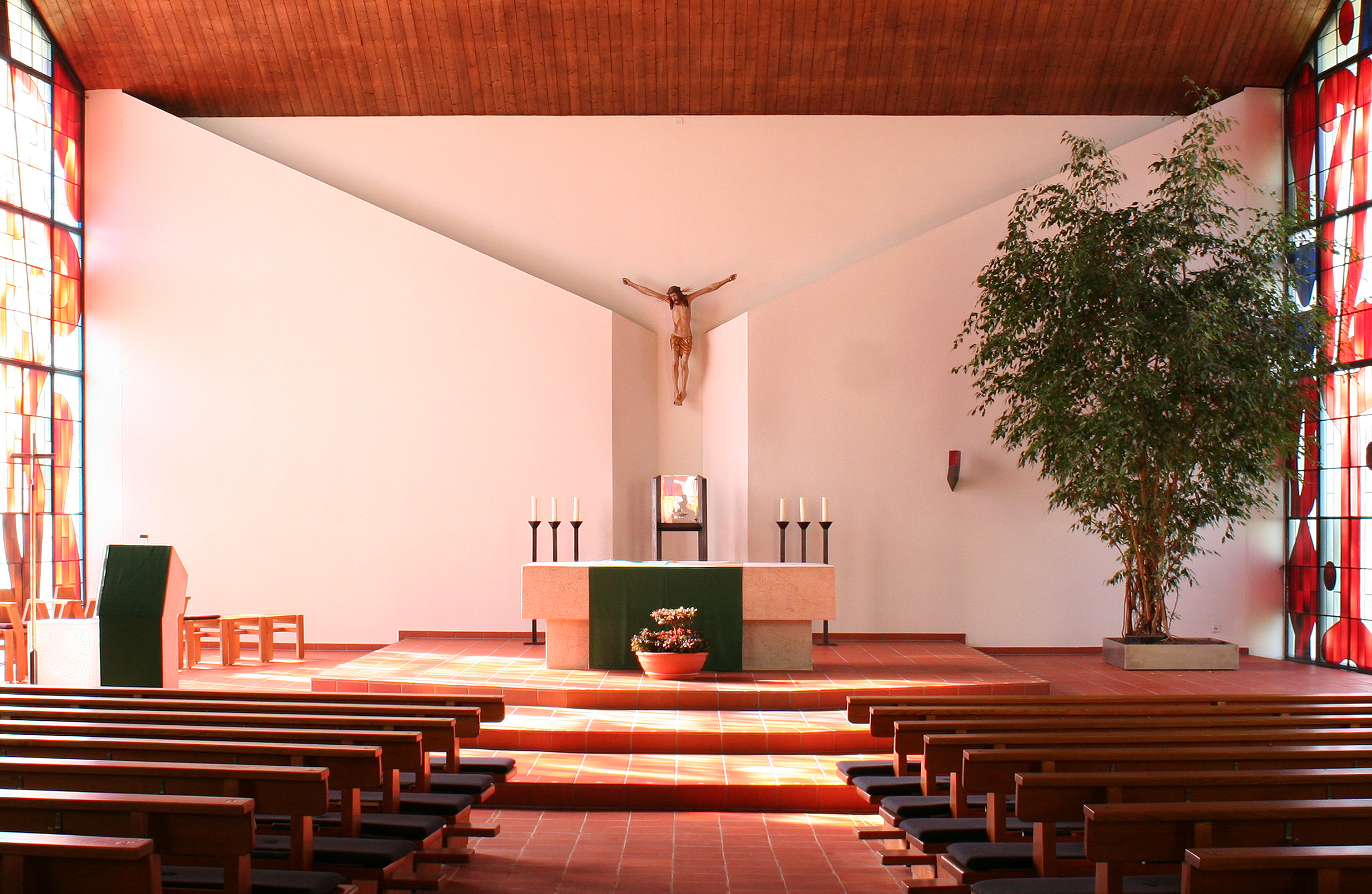 Römisch-katholische Pfarrkirche St. Antonius Wallisellen, Altarraum